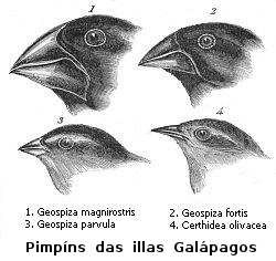 Pinzóns de Darwin ou pinzóns das Galápagos. Darwin, 1845. Diario de investigacións da historia natural e xeología dos países visitados durante a viaxe ol H.M.S. Beagle ó redor do mundo, comandado polo capitán Fitz Roy, R.N. 2ª edición.